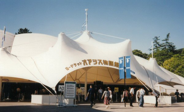 ならシルクロード博覧会、オアシス物語館の写真